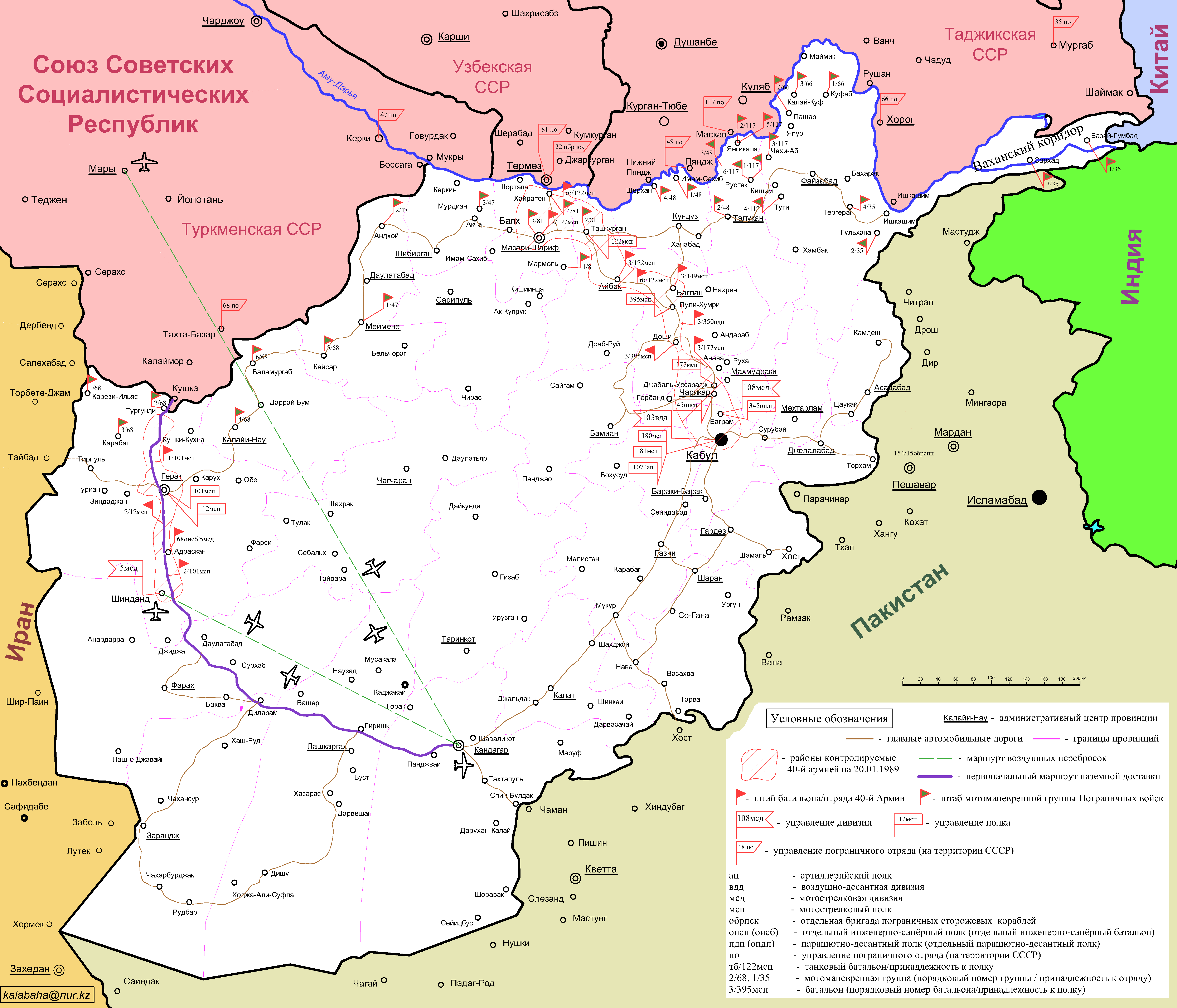 Маршруты воздушных перебросок во время операции Воздушный мост с 20 января по 4 февраля 1989 года